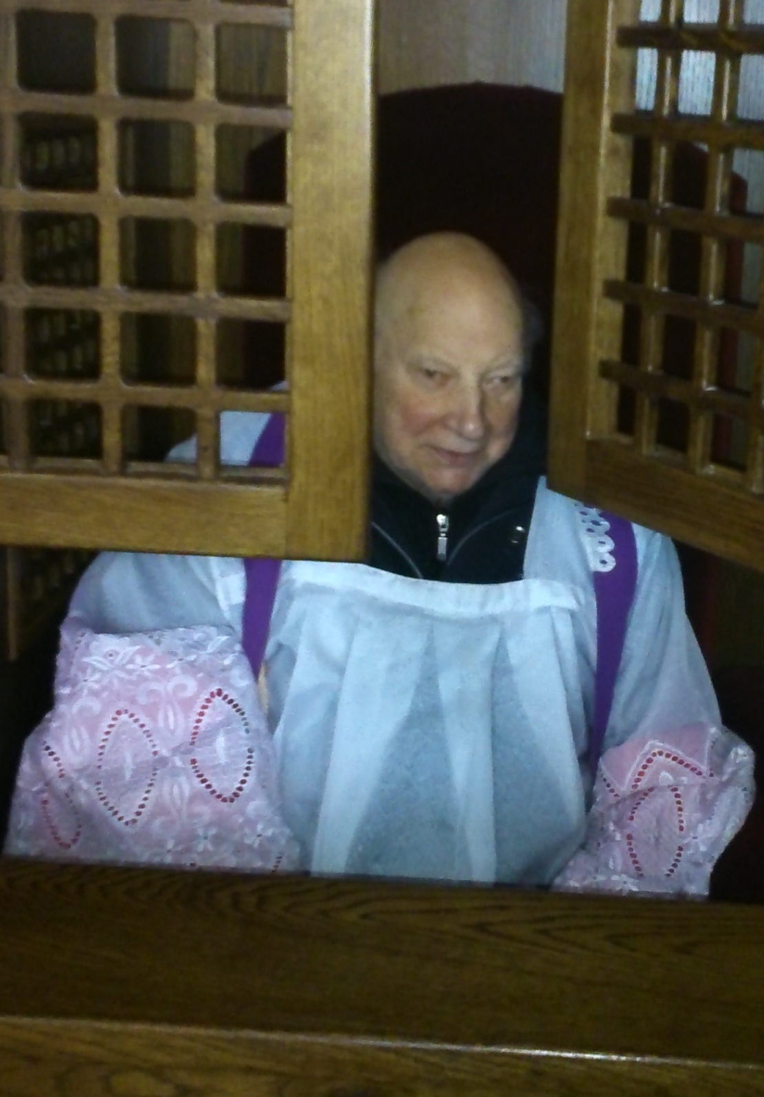 Vincentas Pranckietis